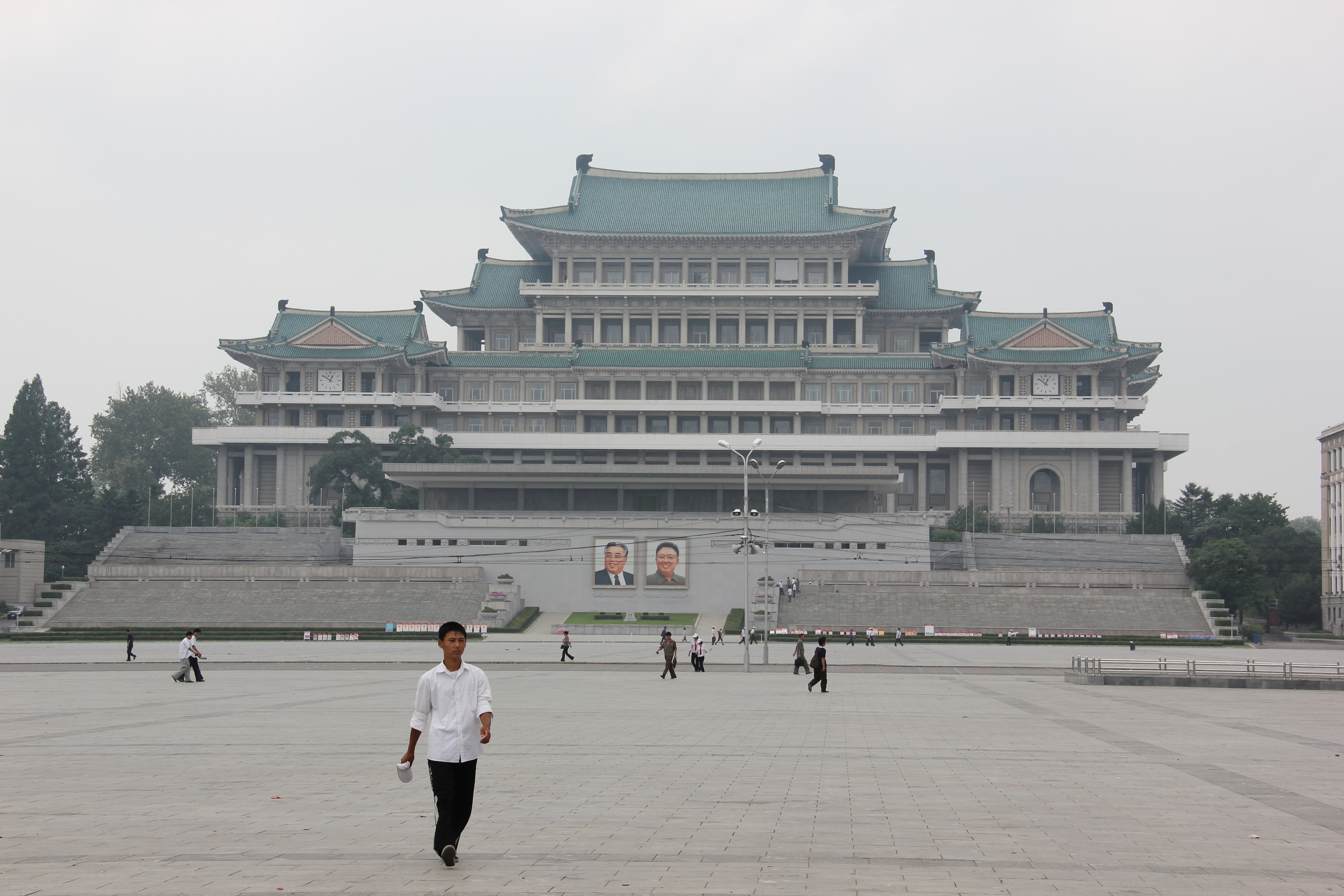 Kim Il Sung Square